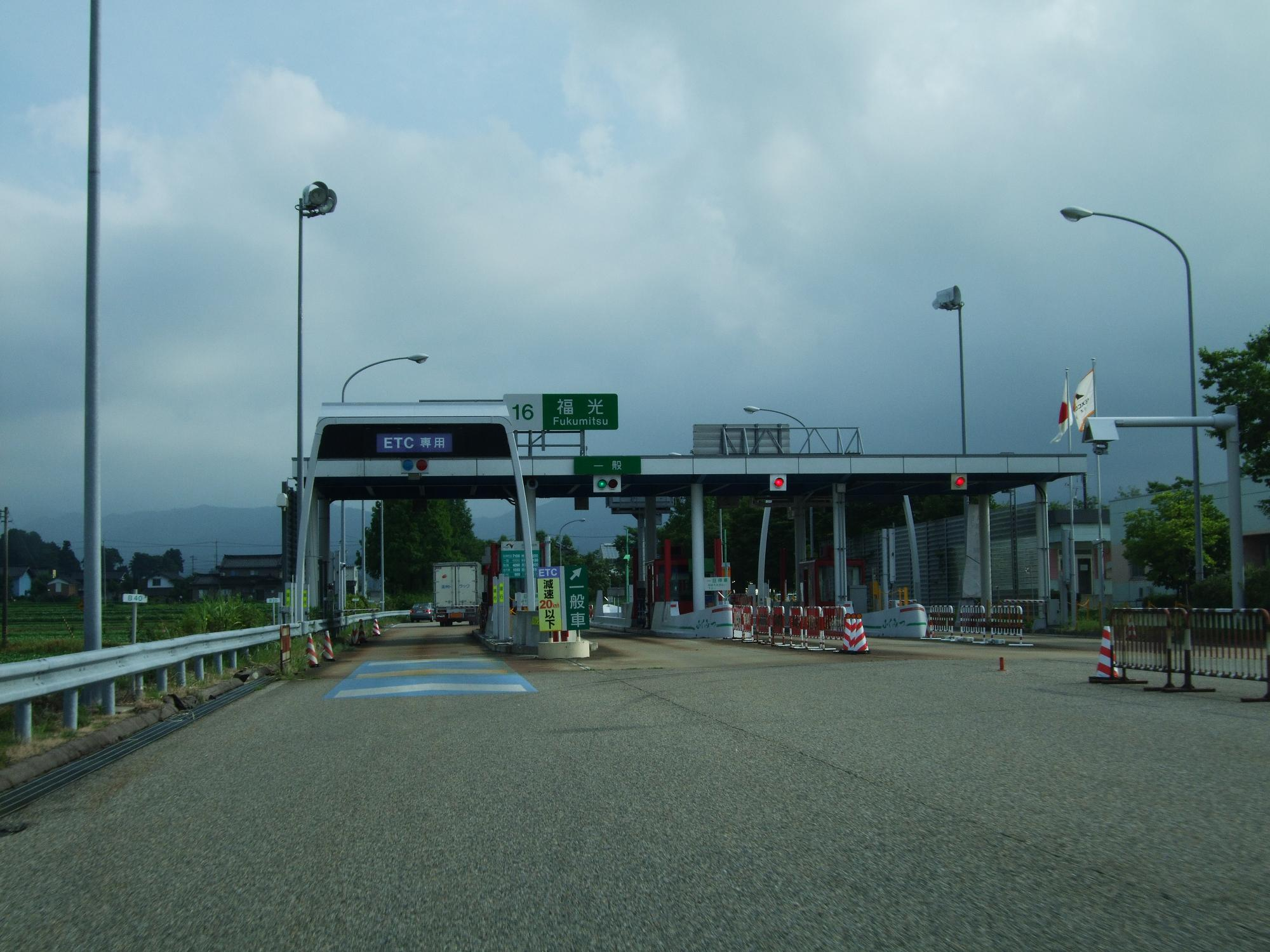 福光インターチェンジ （料金所出口）